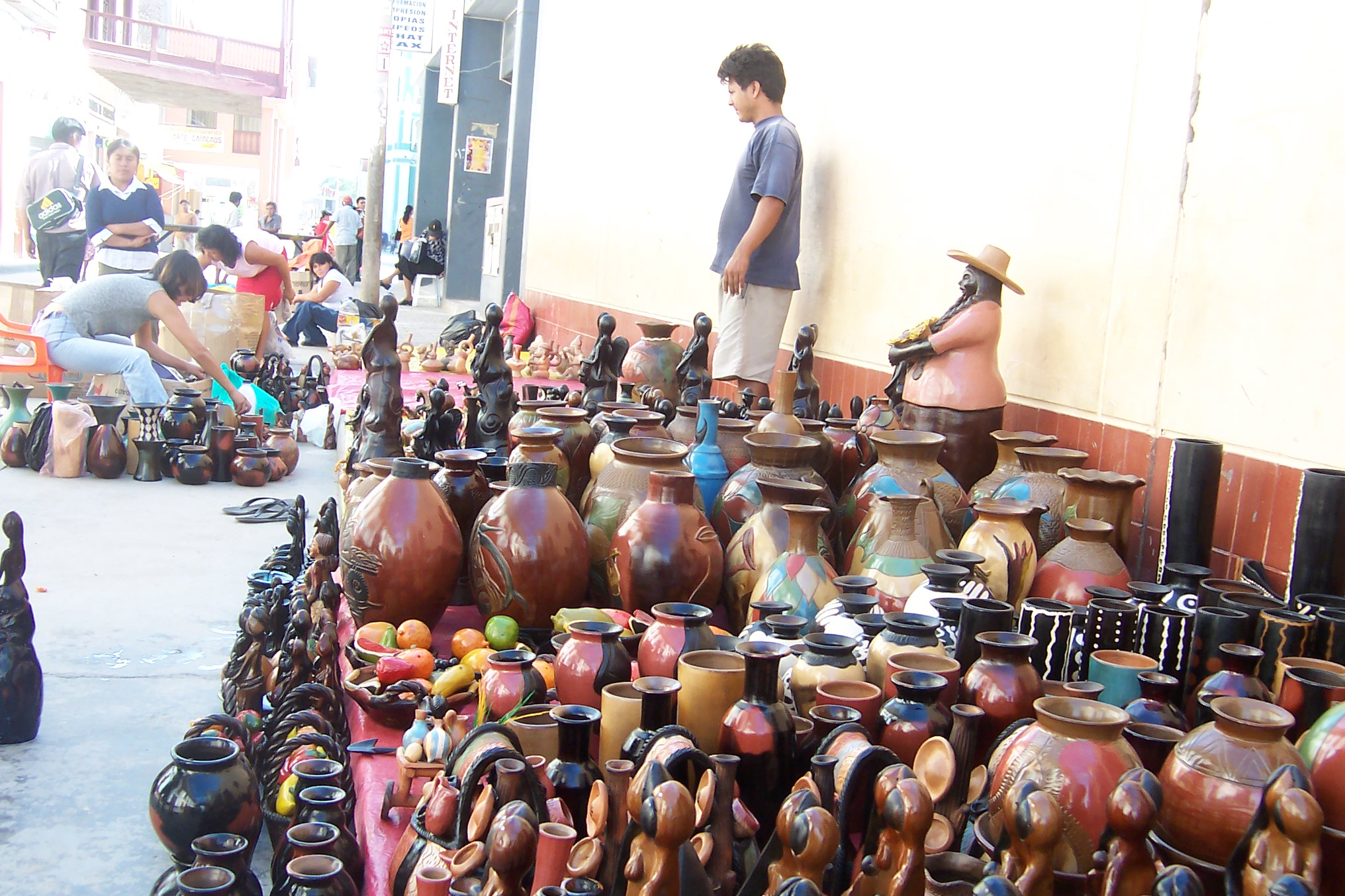 Catacaos venta de artesanias en la calle Autor: Alfredobi Fecha: 2005